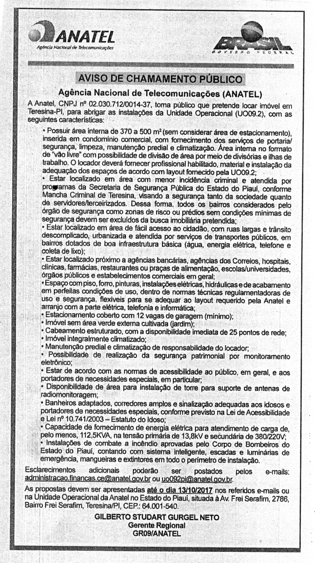 Documento público do governo do Brasil sobre licitação na ANATEL, Agência Nacional de Telecomunicações.